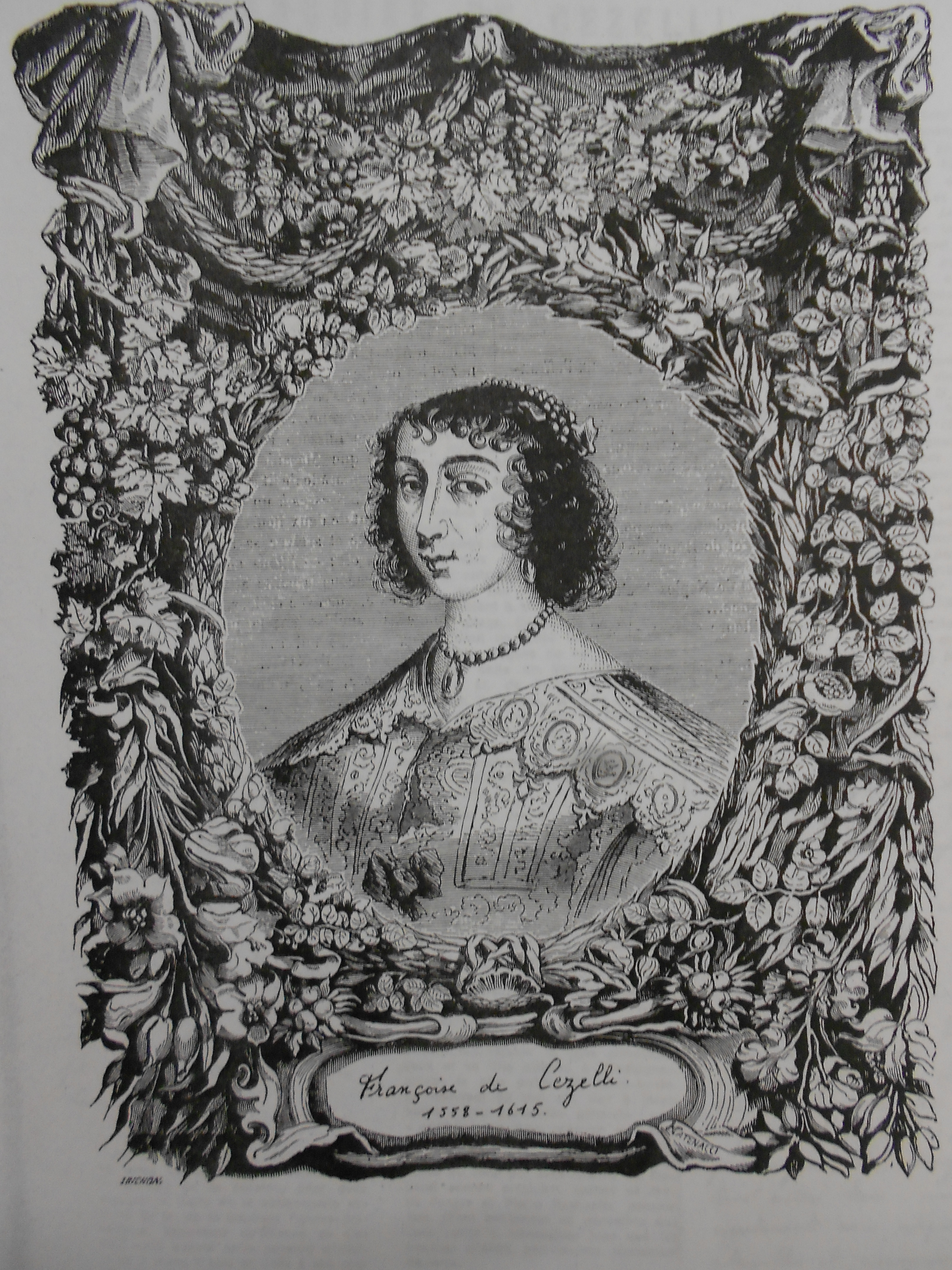 Wikipermanence Femmes et Féminisme dans l'Hérault. 2018-02-06